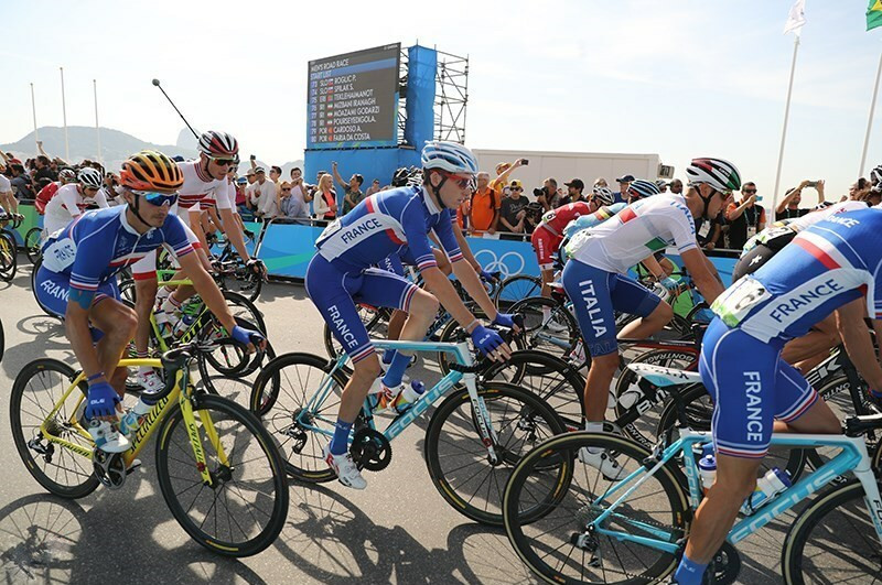 Road cycling at the 2016 Summer Olympics